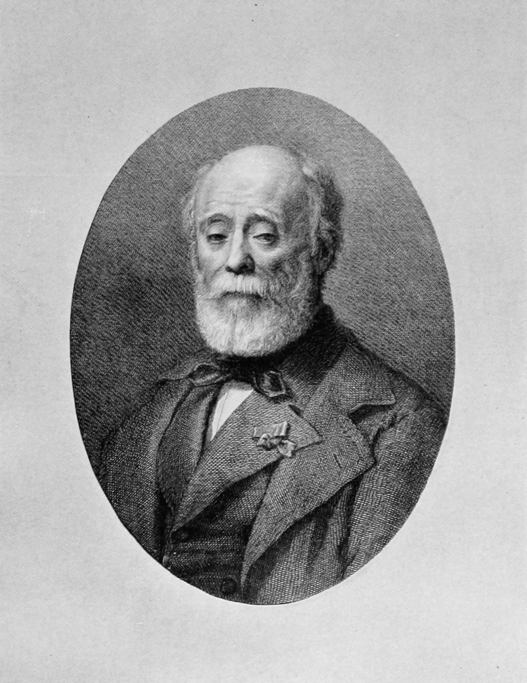 Lyon artistique. Architectes : notices biographiques et bibliographiques avec une table des édifices et la liste chronologique des noms / par E.-L.-G. Charvet.